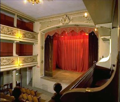 Teatro comunale di Fontanellato (interno)